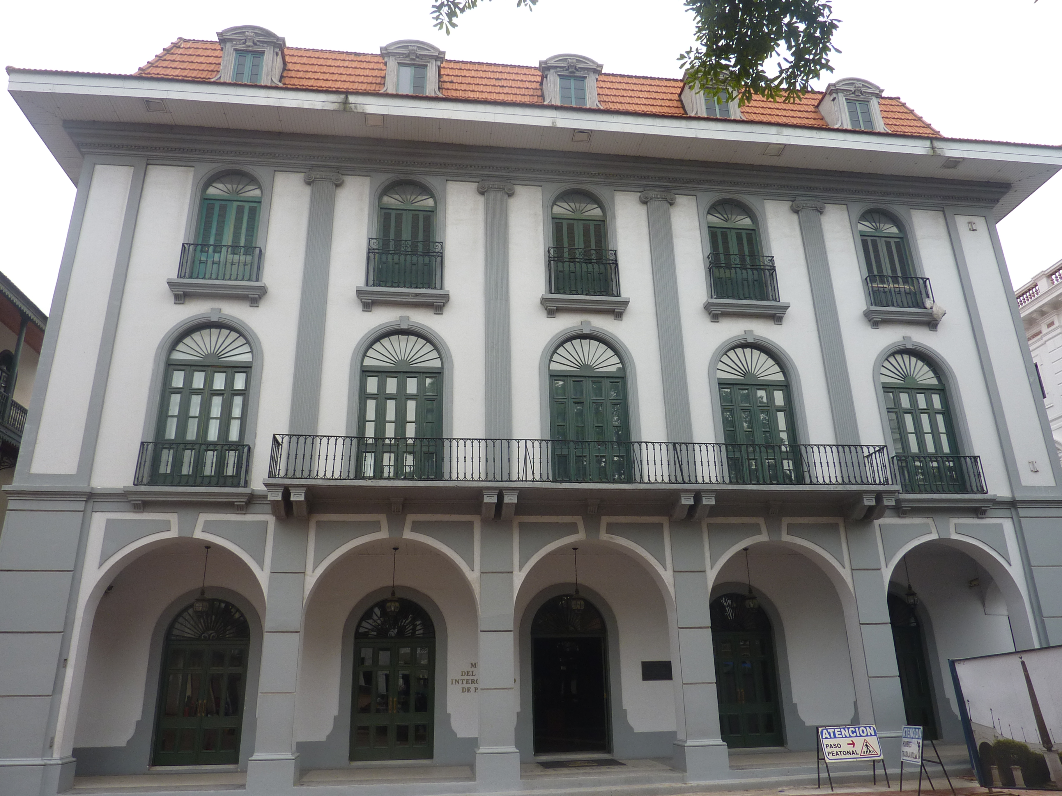 Museo del Canal